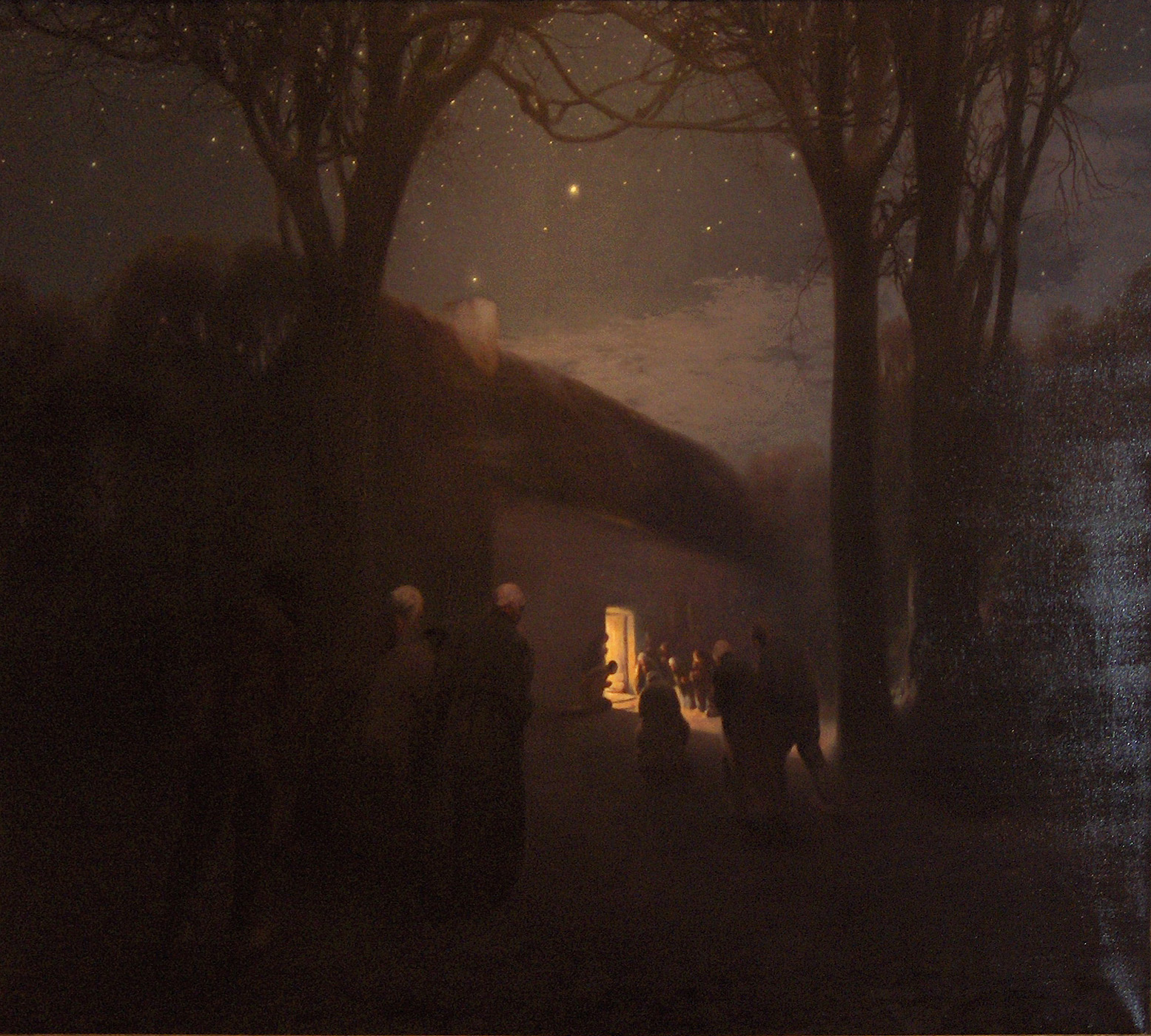 Nachtelijk landschap met Kersttafereel in schuur (1900) (Het kerstgebeuren getransponeerd in een Brabants landschap rond 1900); door de Belgische schilder Firmin Baes (1874-1943)